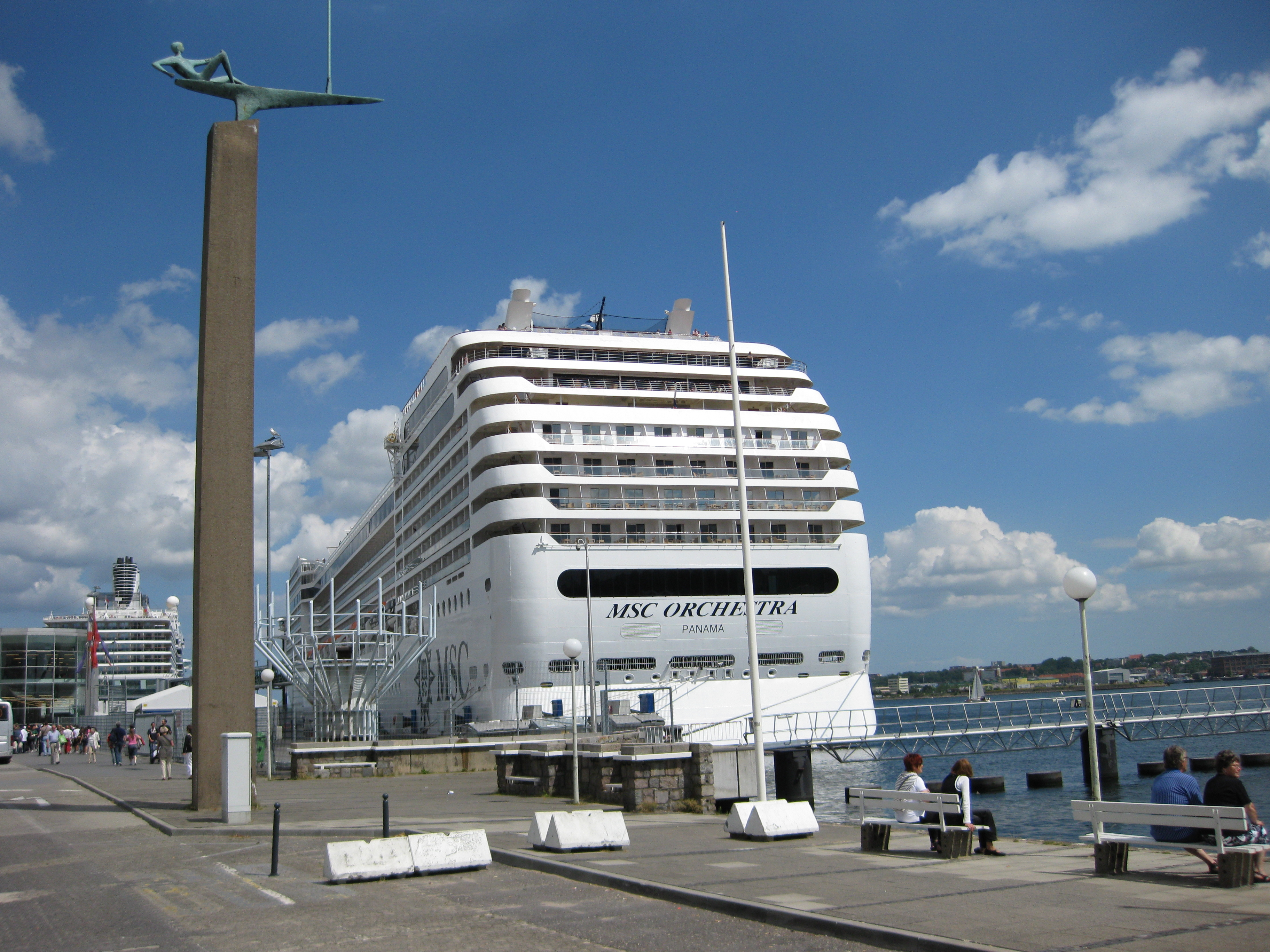 MSC Orchestra im Hafen von Kiel